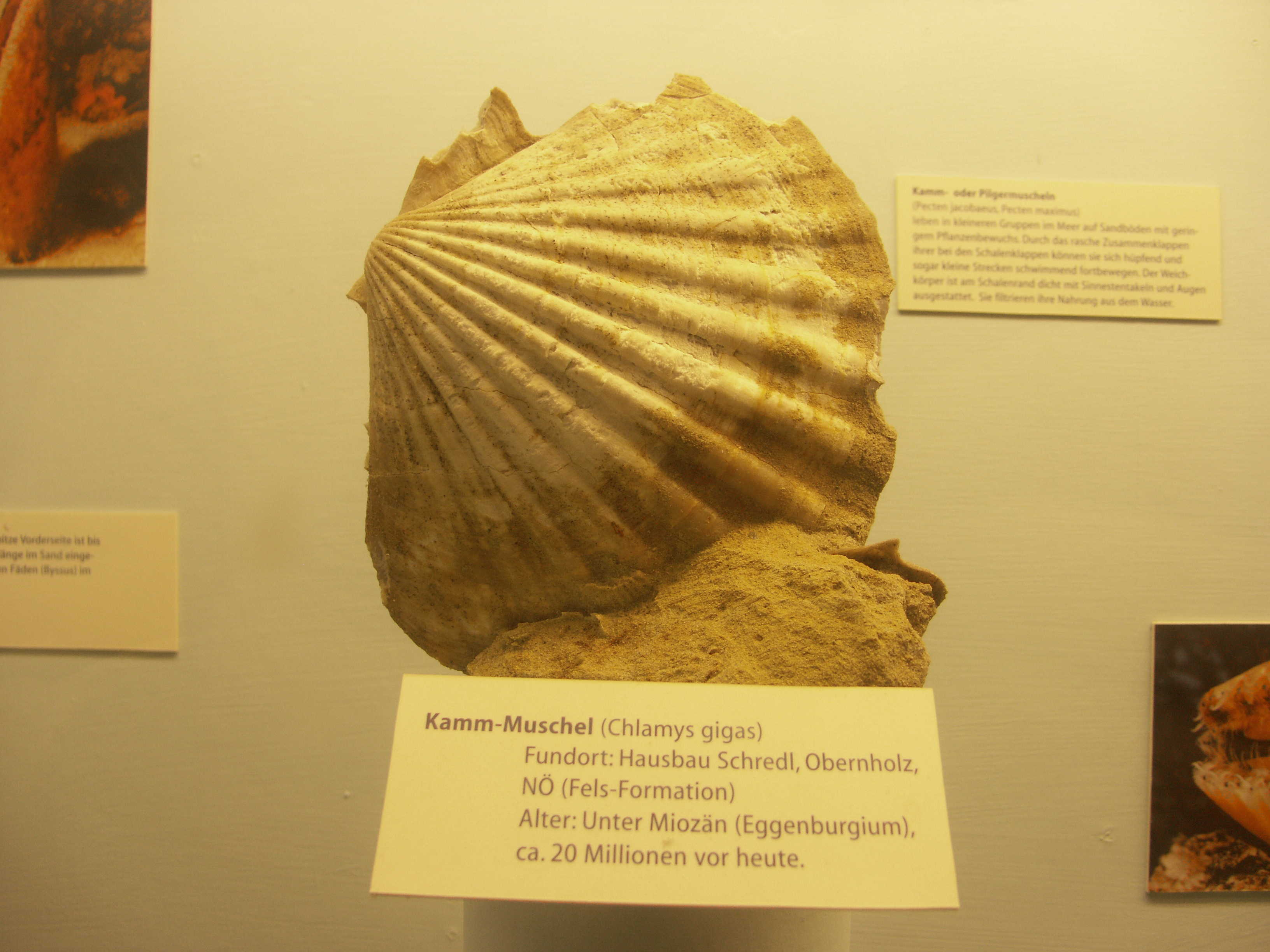 Fossilienschauraum Obernholz Kammmuschel